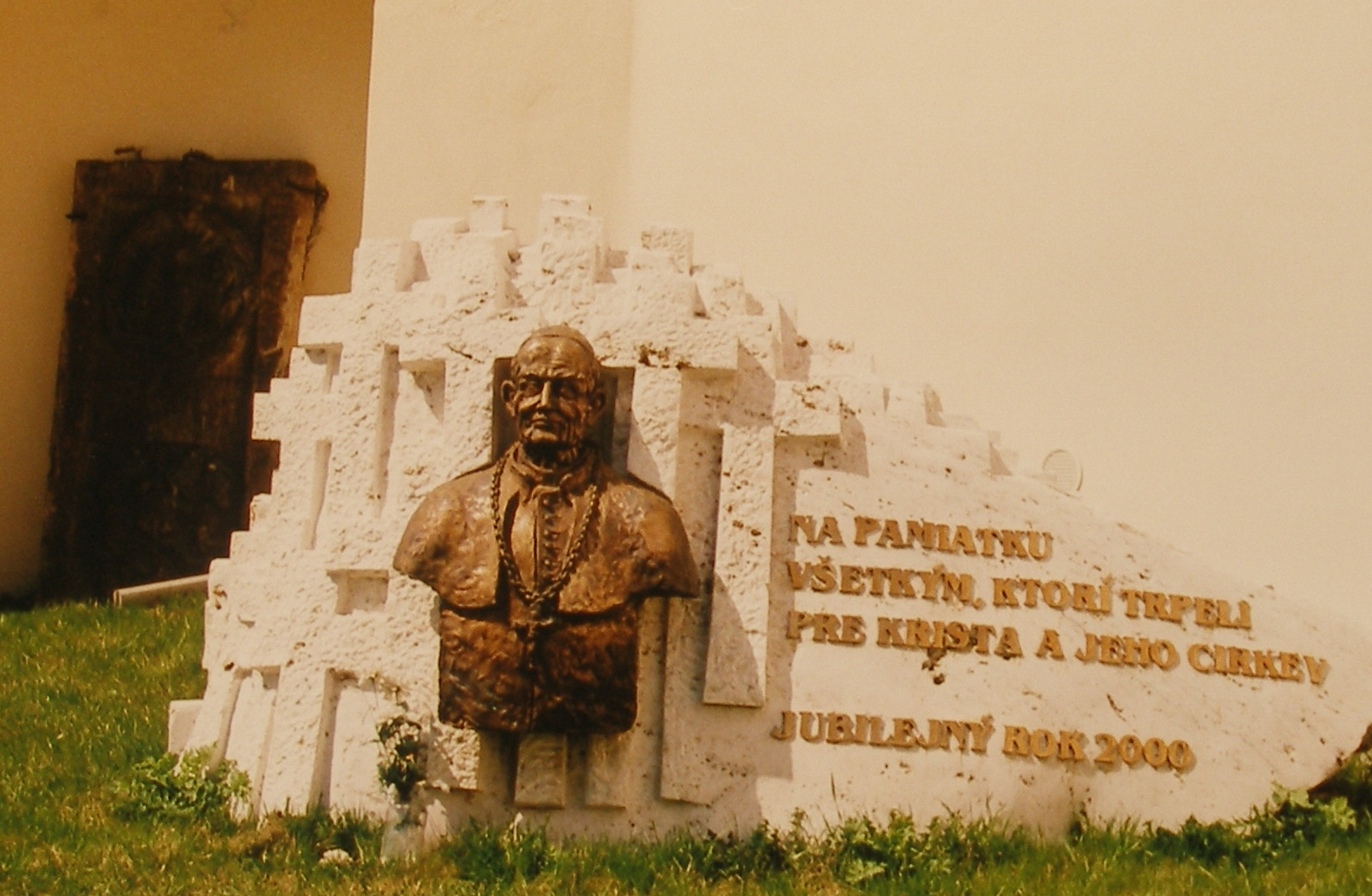 Spišská Kapitula, súčasť mestečka Spišské Podhradie, región Spiš. Pamätník trpiacim kresťanom.